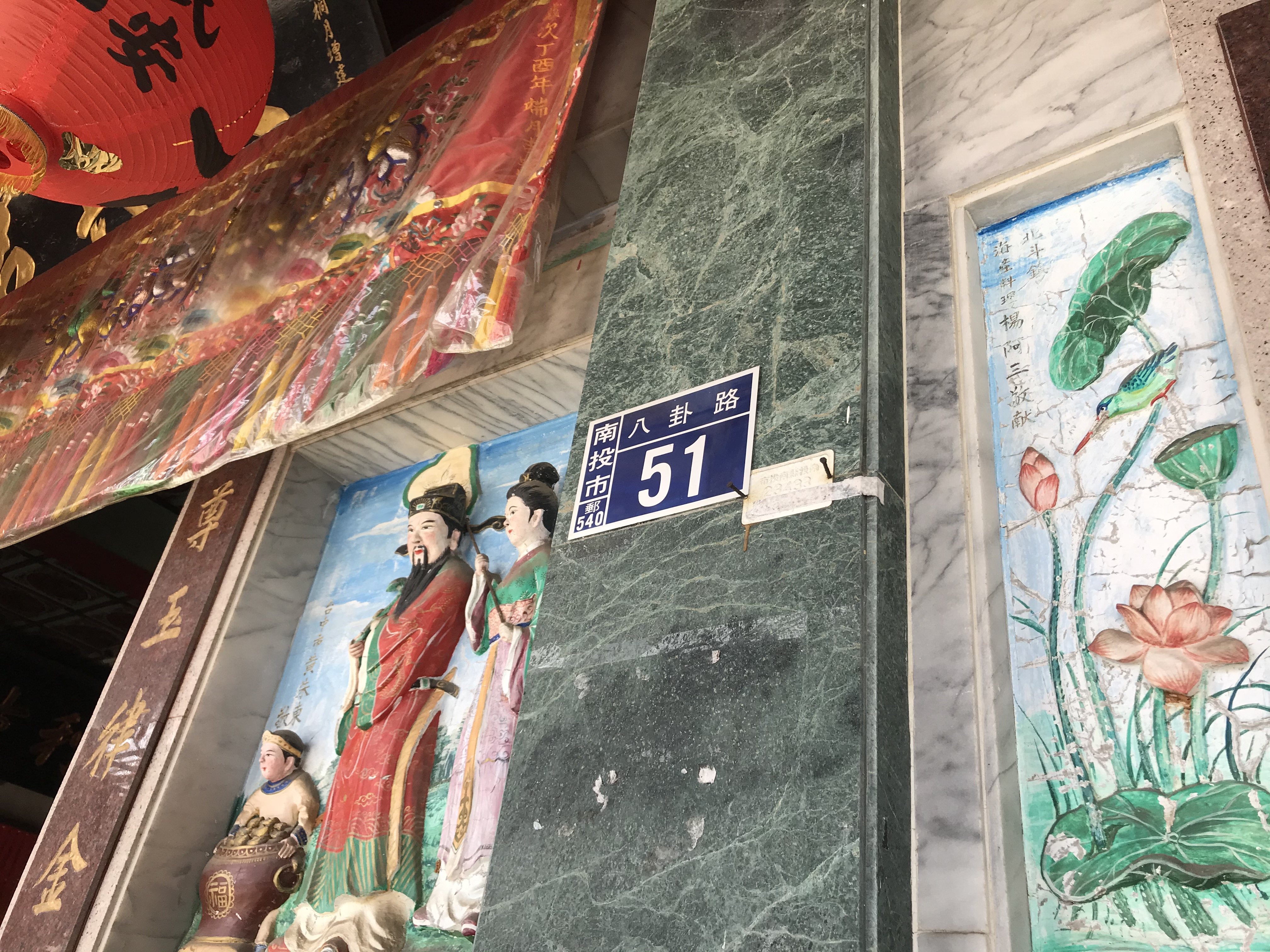 南投永興宮門牌